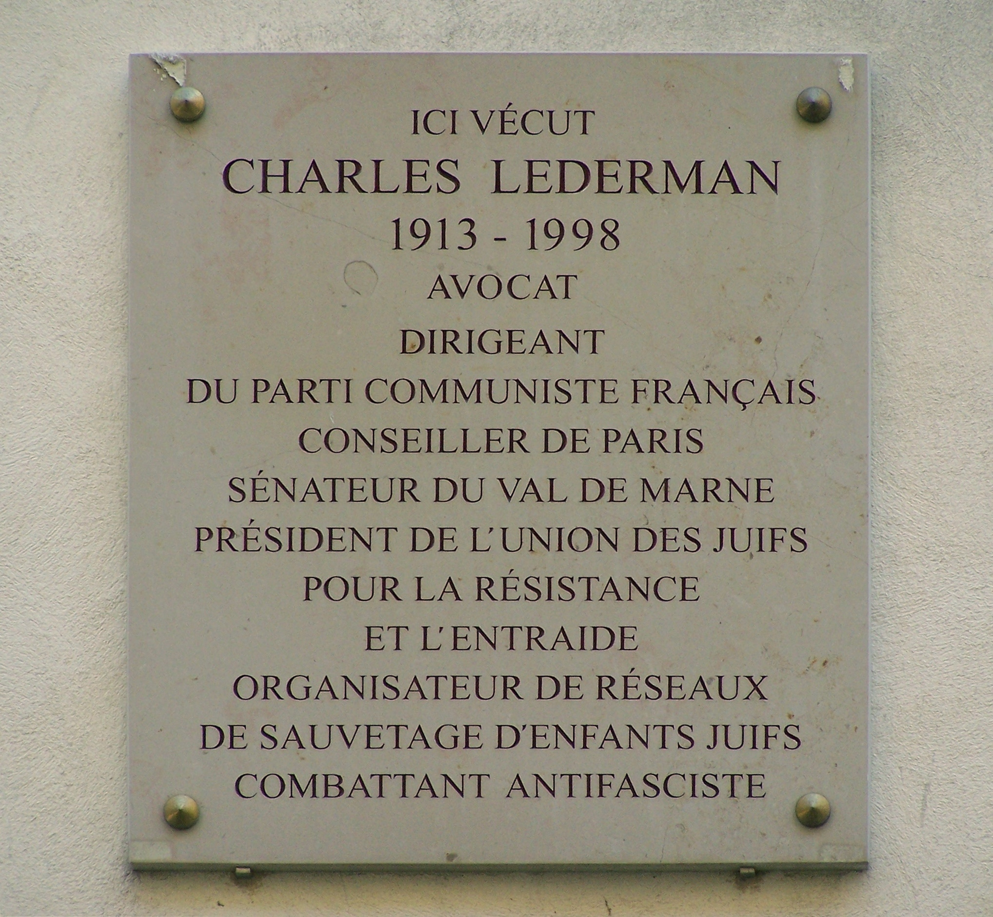 Plaque commémorative à la mémoire du résistant et sénateur français Charles Lederman qui a vécu au numéro 4 de la rue Saint-Louis-en-l'Île, à Paris.